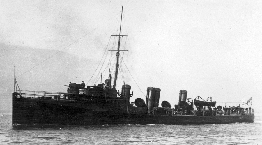 Der britische Turbinenzerstörer HMS Bonetta